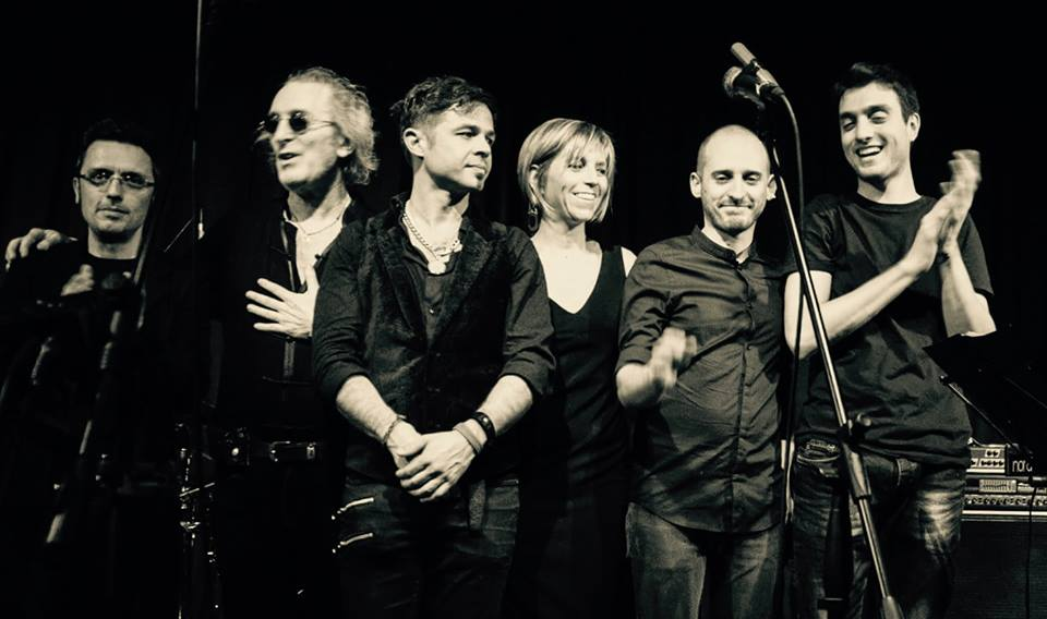 Presentation of new Album "Eros & Thanatos"